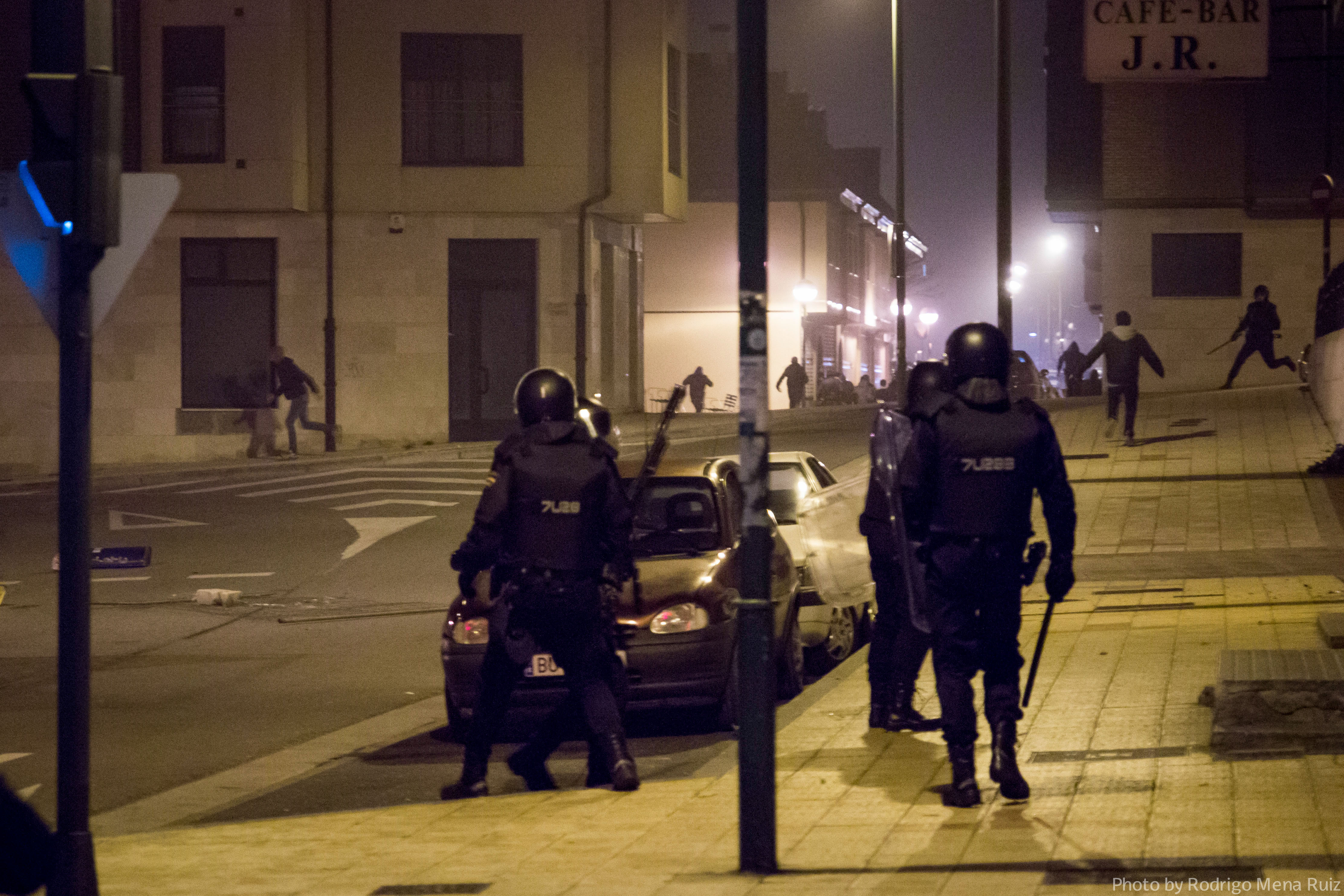 Obras Bulevar de Gamonal. 11 de enero 2014. Día 3 de protestas. Enfrentamientos con la policía.